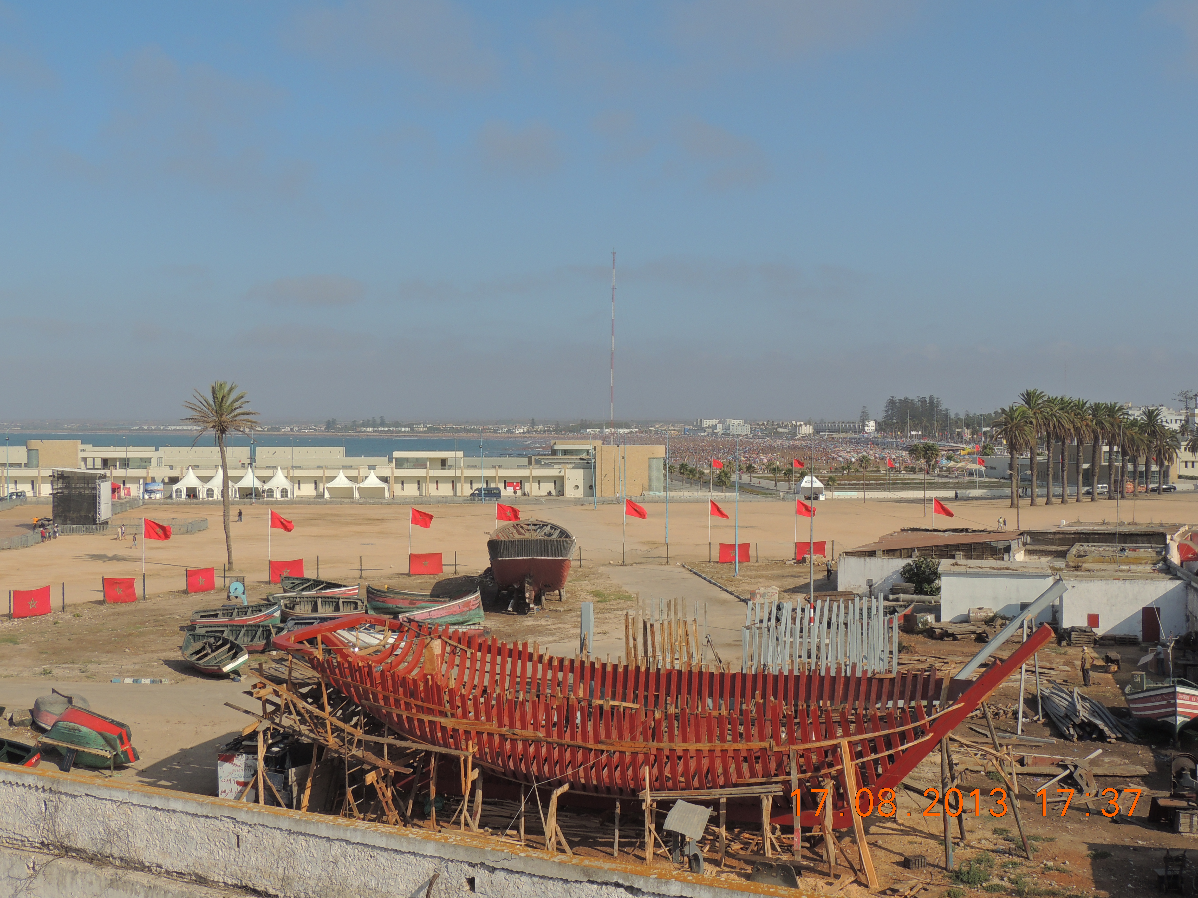 el jadida